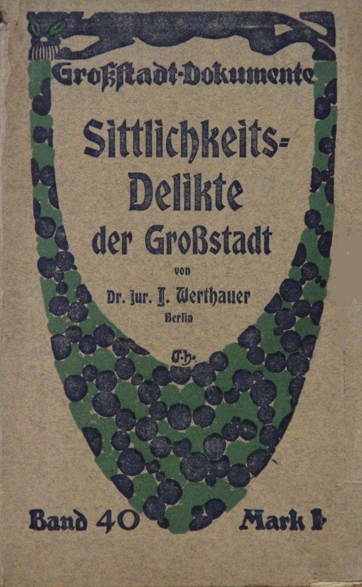 Johannes Werthauer: Sittlichkeitsdelikte der Großstadt. Berlin: Hermann Seemann Nachfolger, c. 1907 Großstadt-Dokumente Band 40, hrsg. von Hans Ostwald